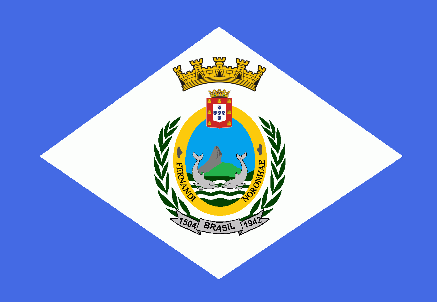 Bandeira do distrito estadual de Fernando de Noronha, Pernambuco, Brasil.